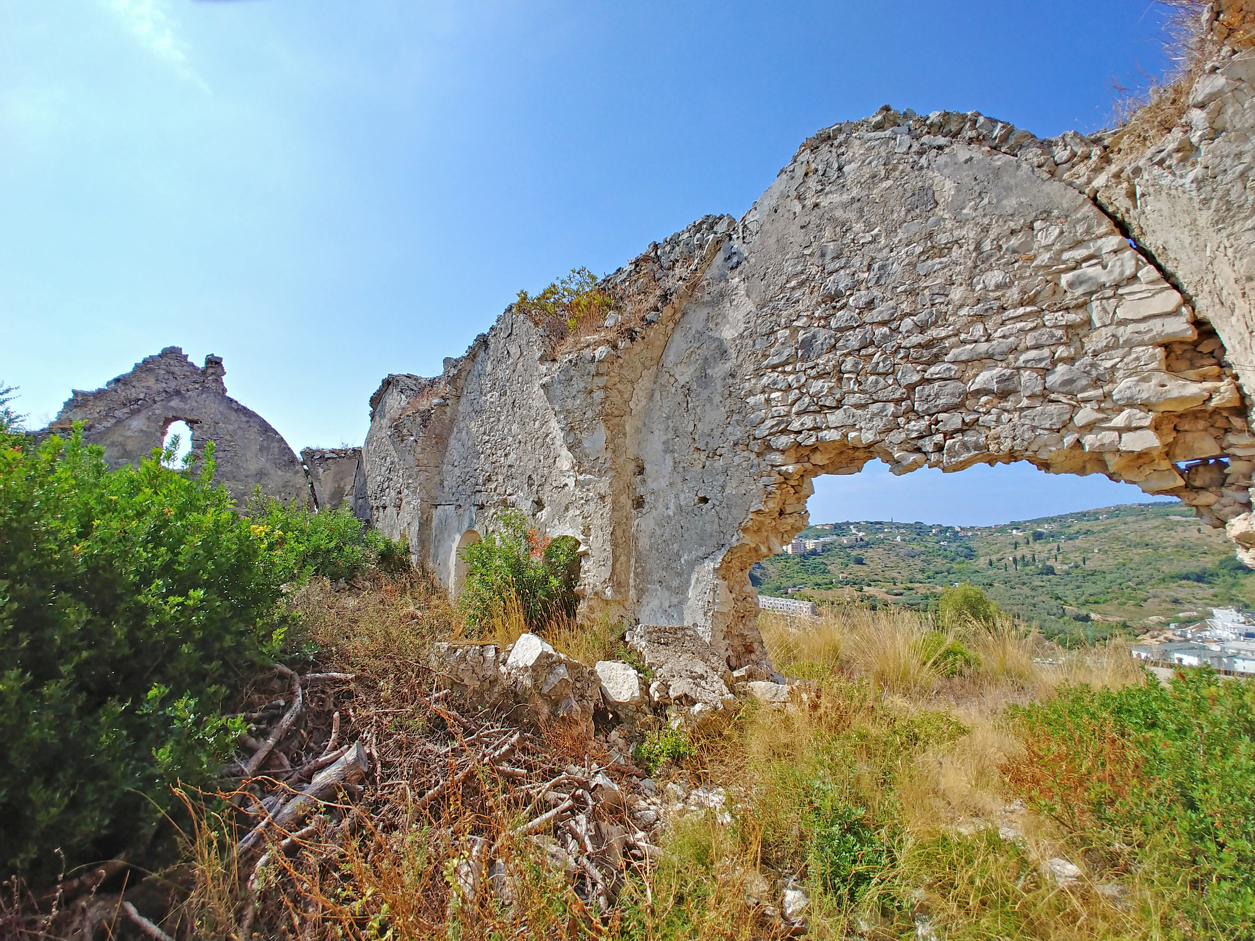 Interno.